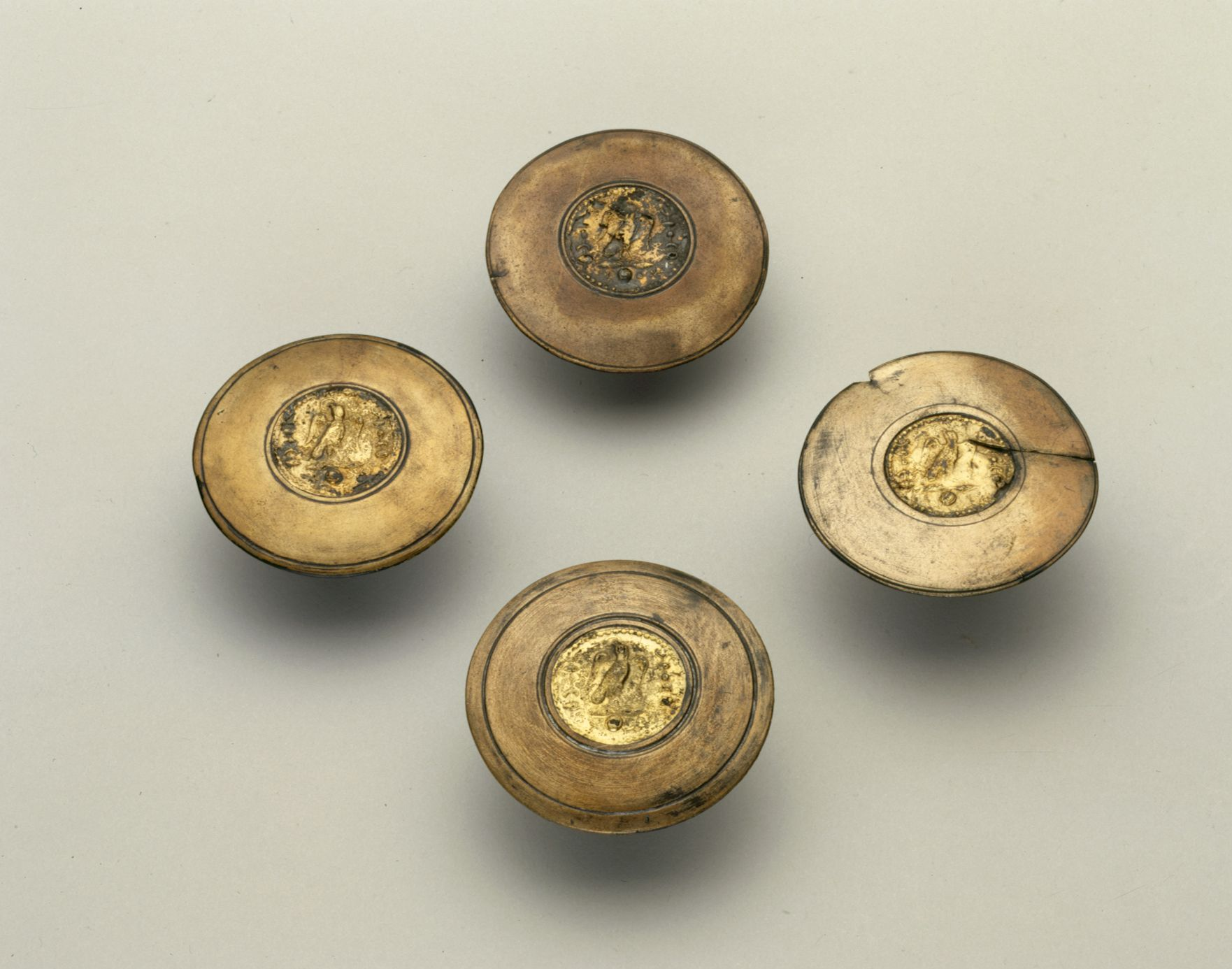 Balteus-beslag af forgyldt bronze m. ørn. Fra Vimose, Næsbyhoved-Broby sogn. Yng. rom. jern.